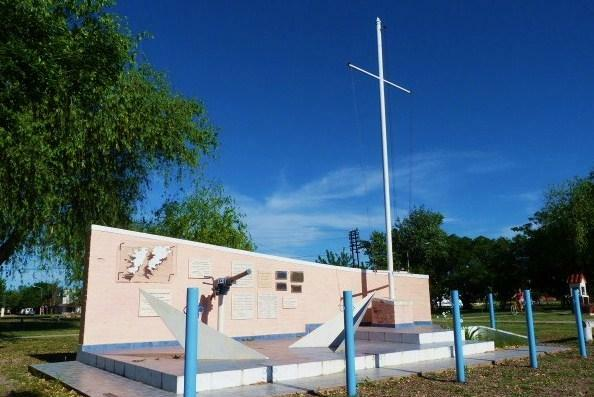 Plazoleta Islas Malvinas Laguna Paiva